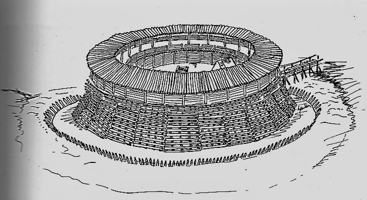 Торнов в Нижних Лужицах